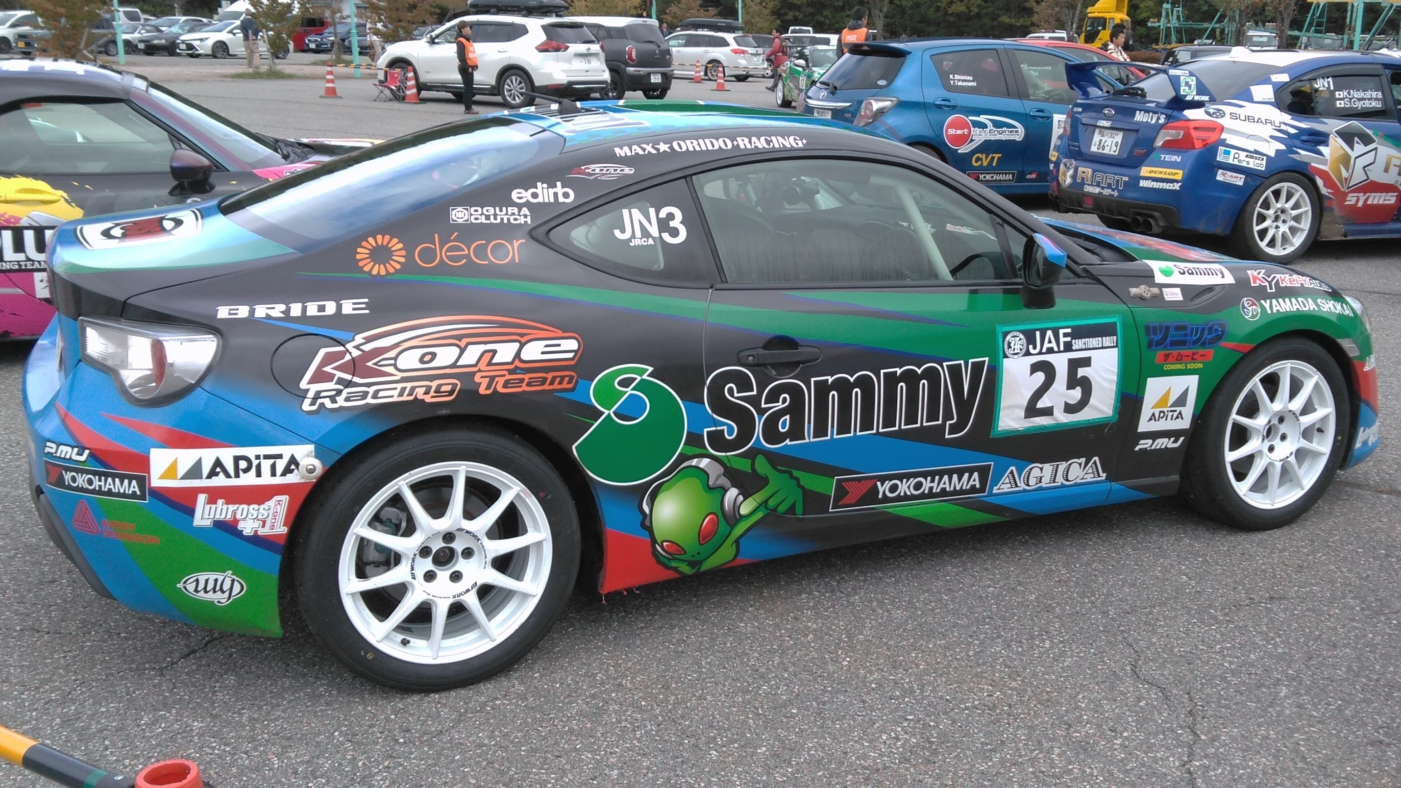 全日本ラリー選手権に参戦する織戸学のトヨタ・86